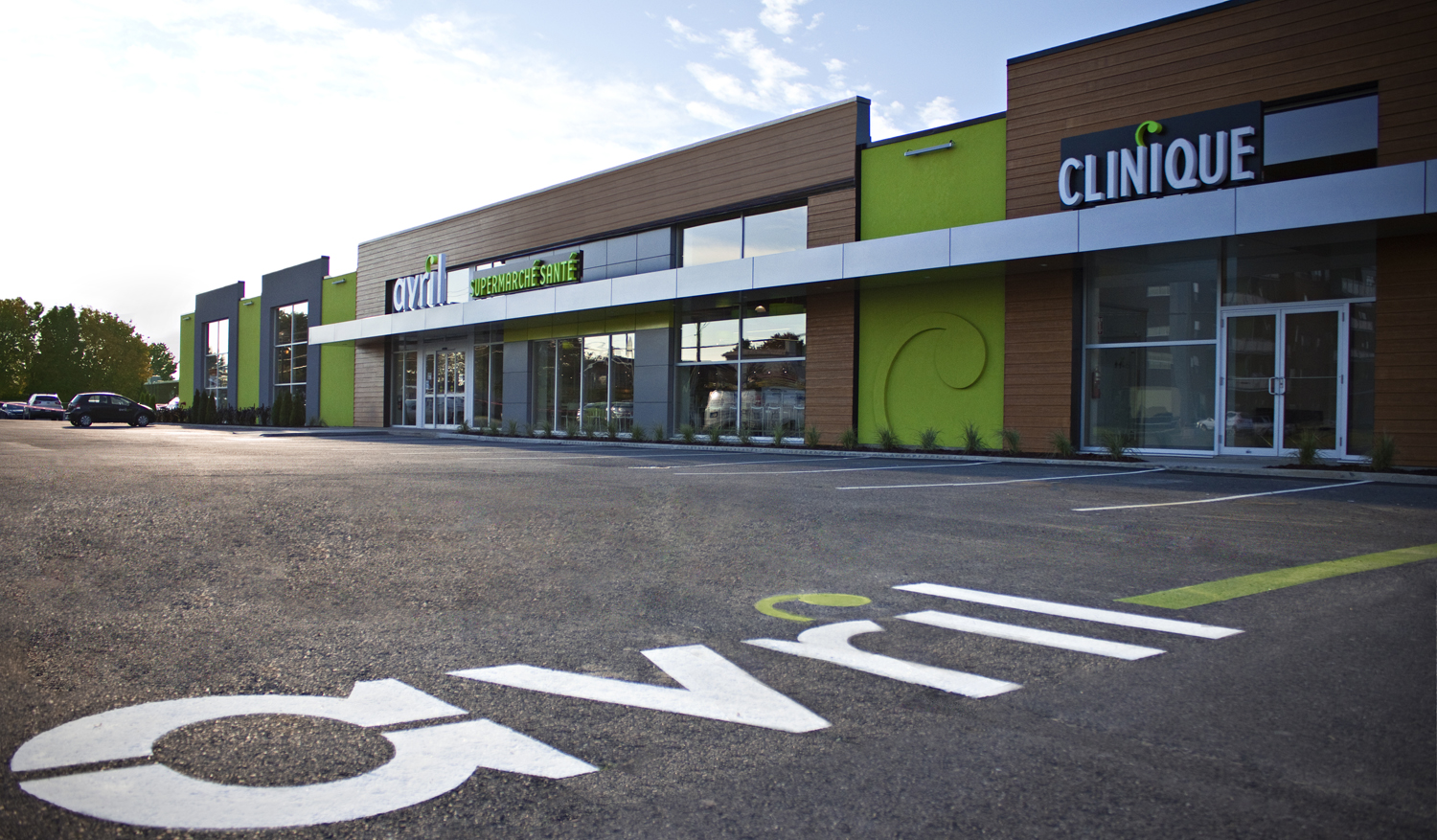 Photo du magasin Avril de Granby